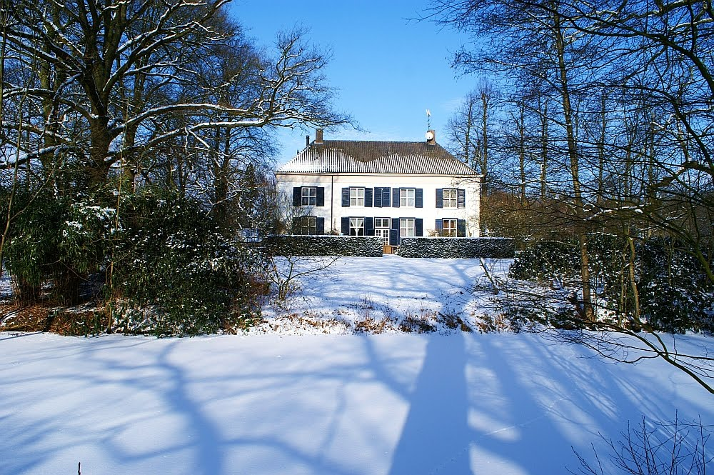 Kasteel de Kleine Ruwenberg of Huize Boecoop.